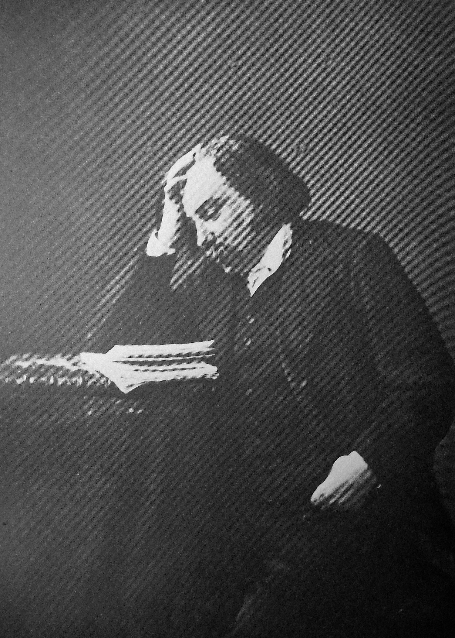 Portrait de Charles Asselineau. Photographie par Nadar. Bibliothèque nationale de France, cabinet des estampes (Na 235/143).